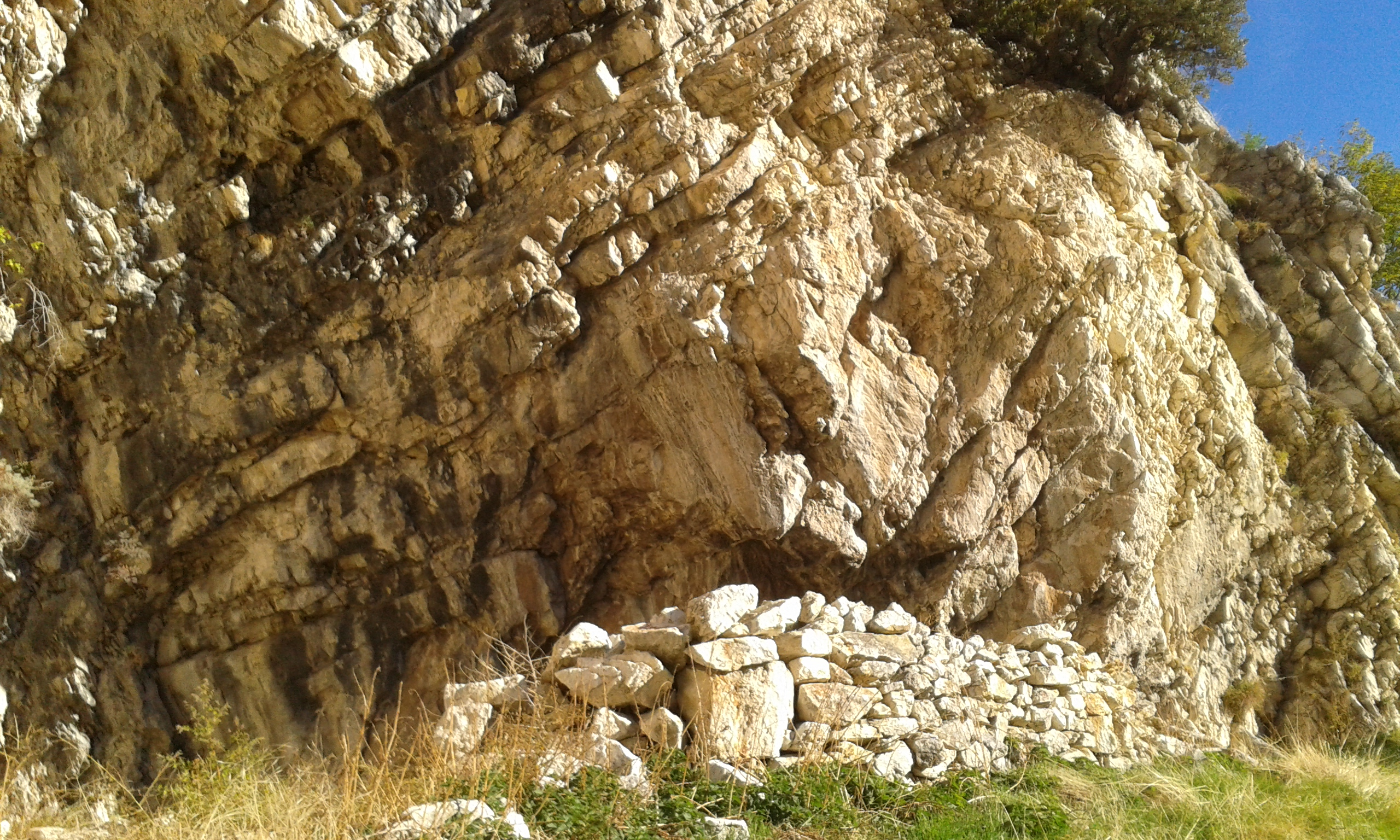 Monti Sibillini: resti di un casale lungo la strada antica che per Monte Pizzo conduceva da Vetice (Montefortino) all'eremo di San Leonardo